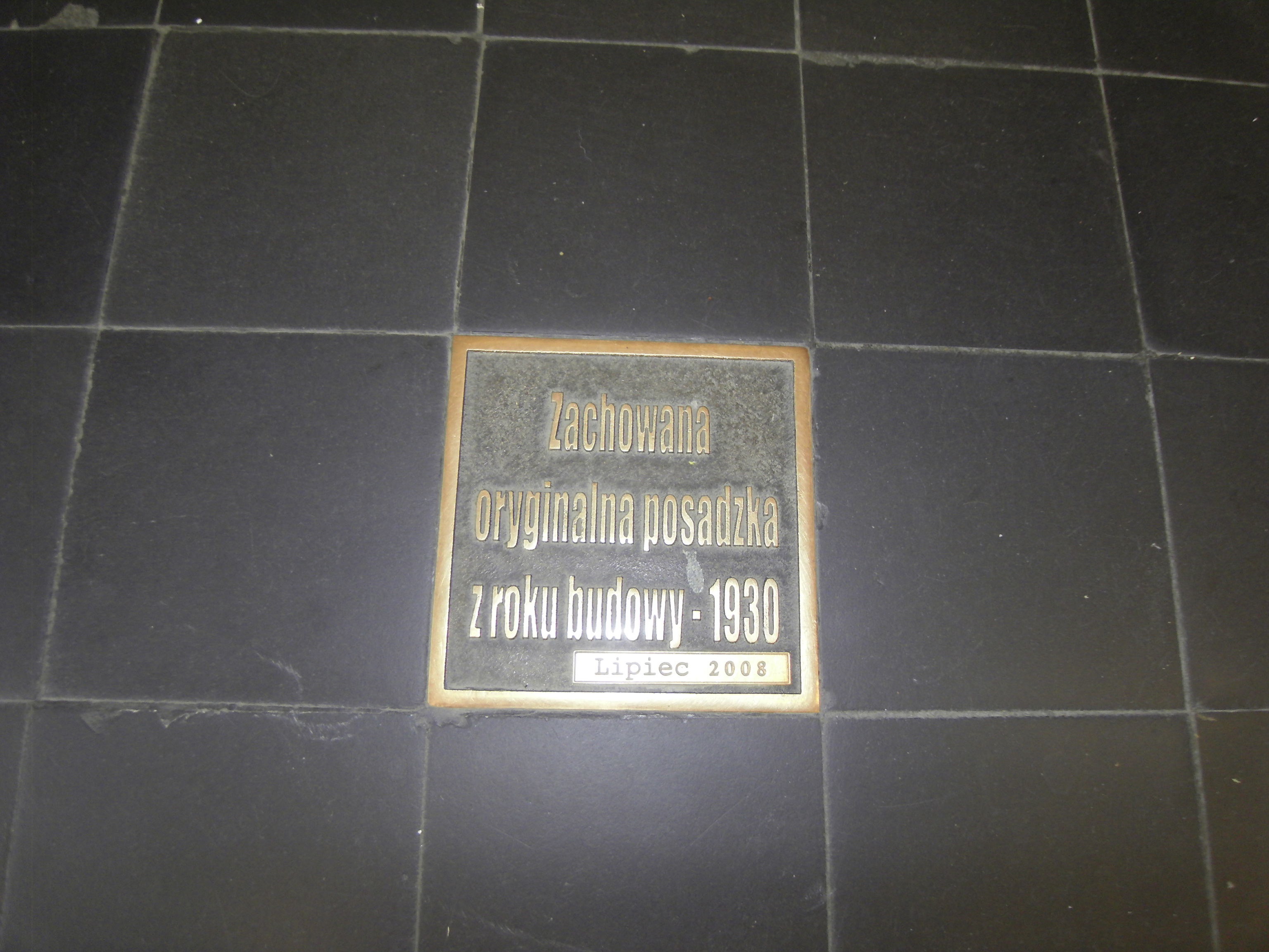 posadzka